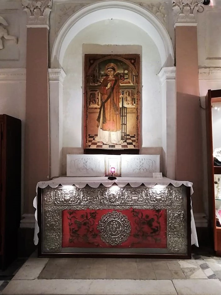 Dipinto raffigurante San Lorenzo e altare marmoreo con paliotto argenteo.